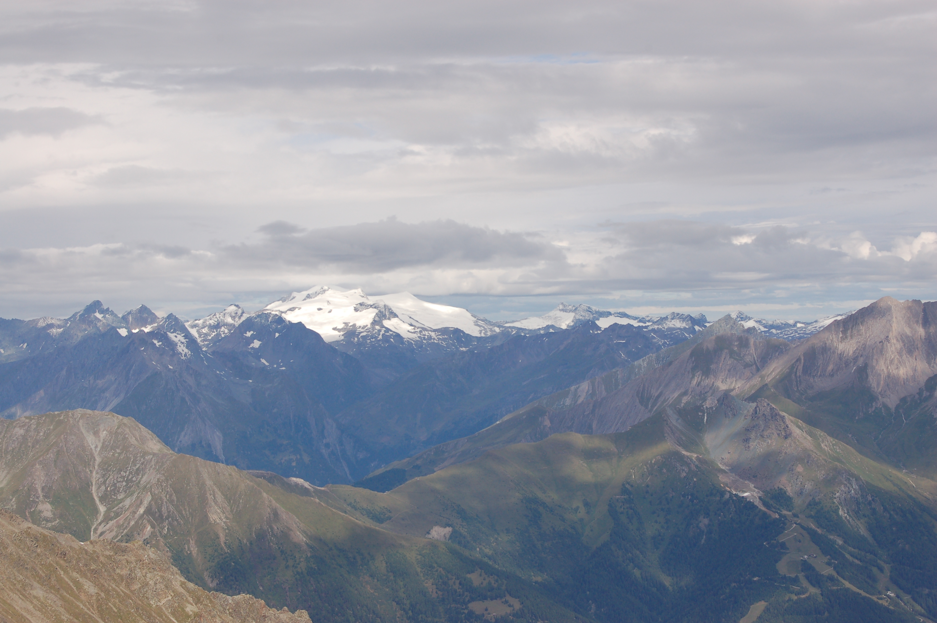 Teile der Venedigergruppe im Nationalpark Hohe Tauern. This file shows the National Park Hohe Tauern in Austria.